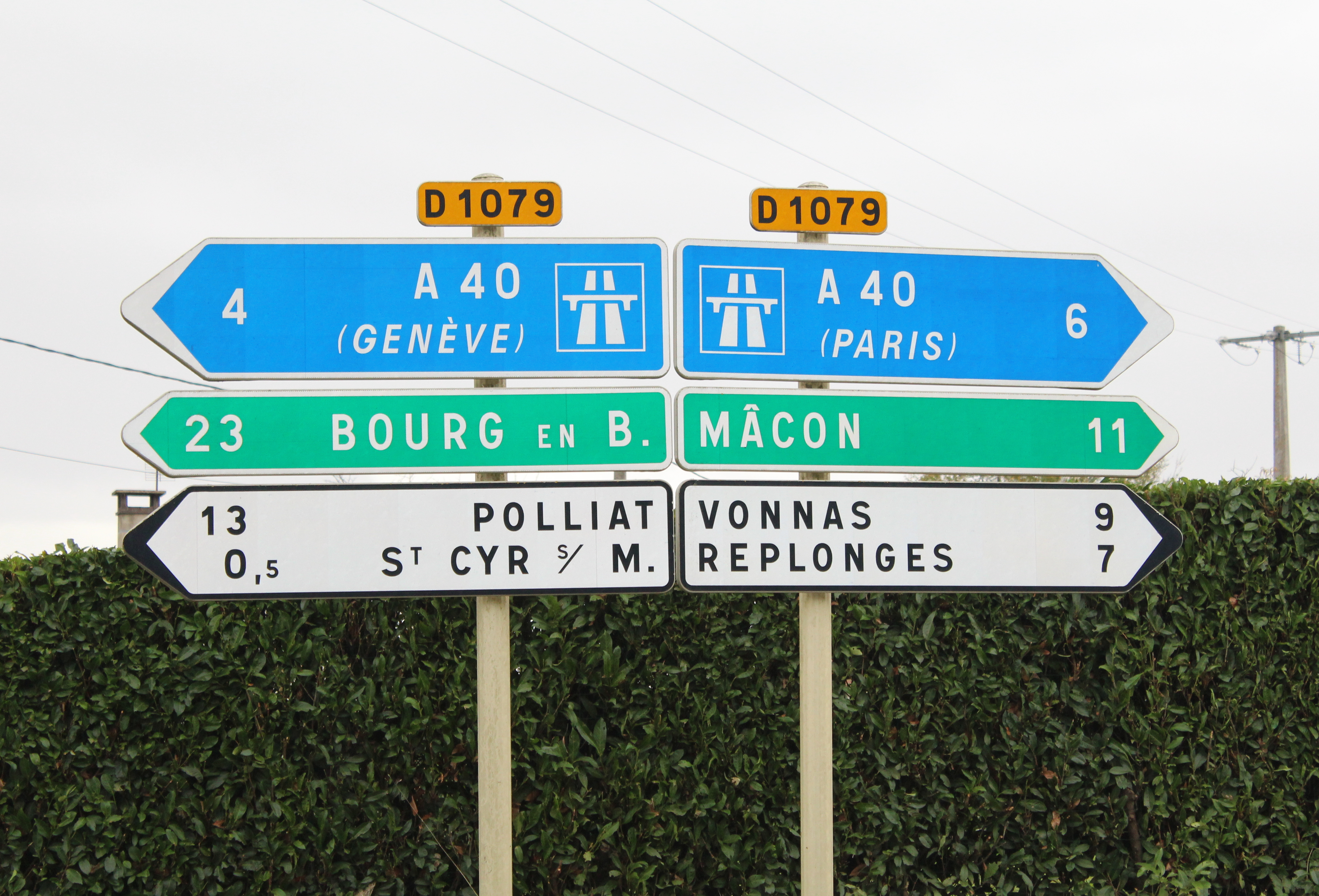 Panneaux de direction sur la route D1079 près de la route de Loëze, Saint-Cyr-sur-Menthon.